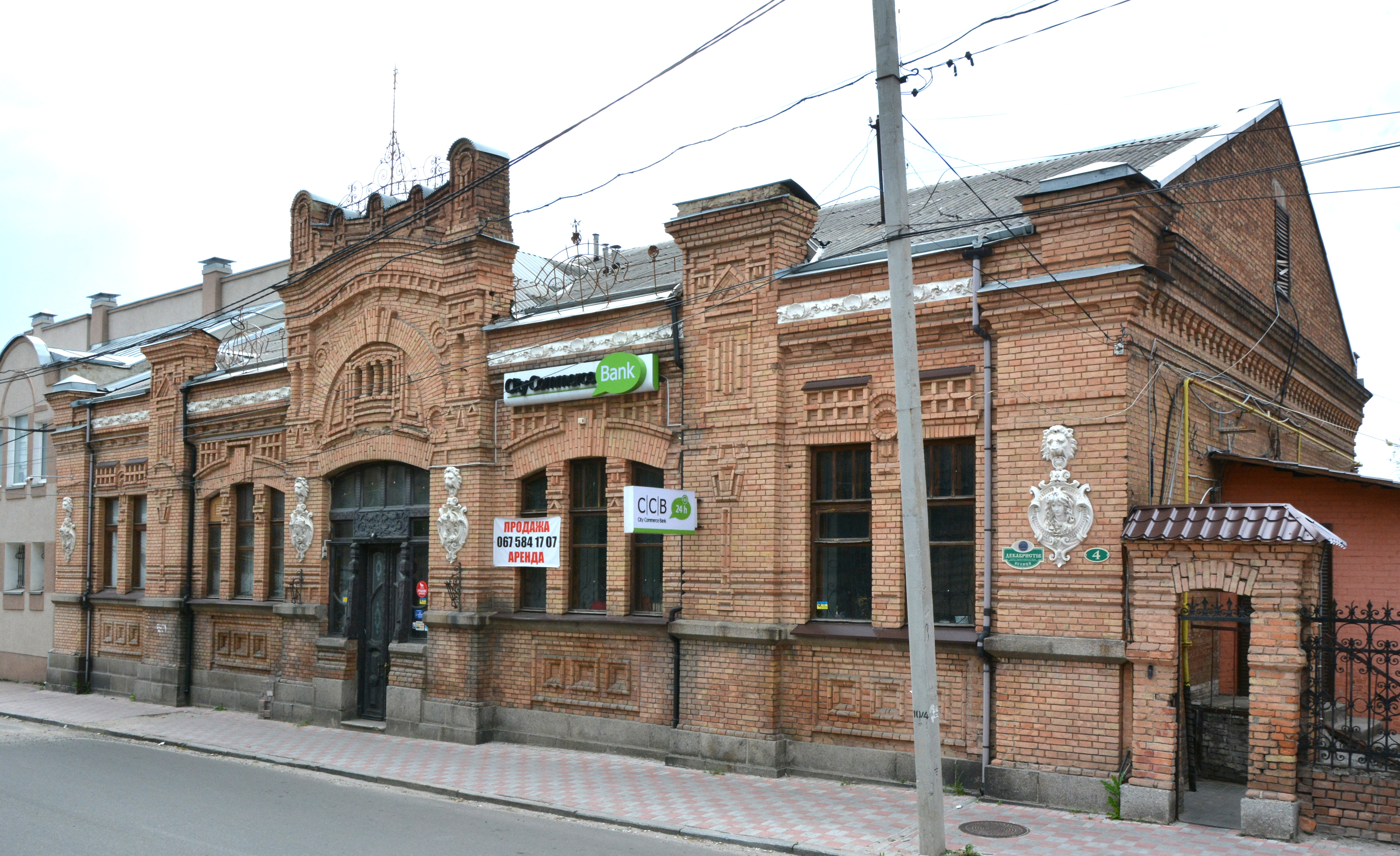 Будинок поміщика, Кіровоград, вул. Декабристів, 4